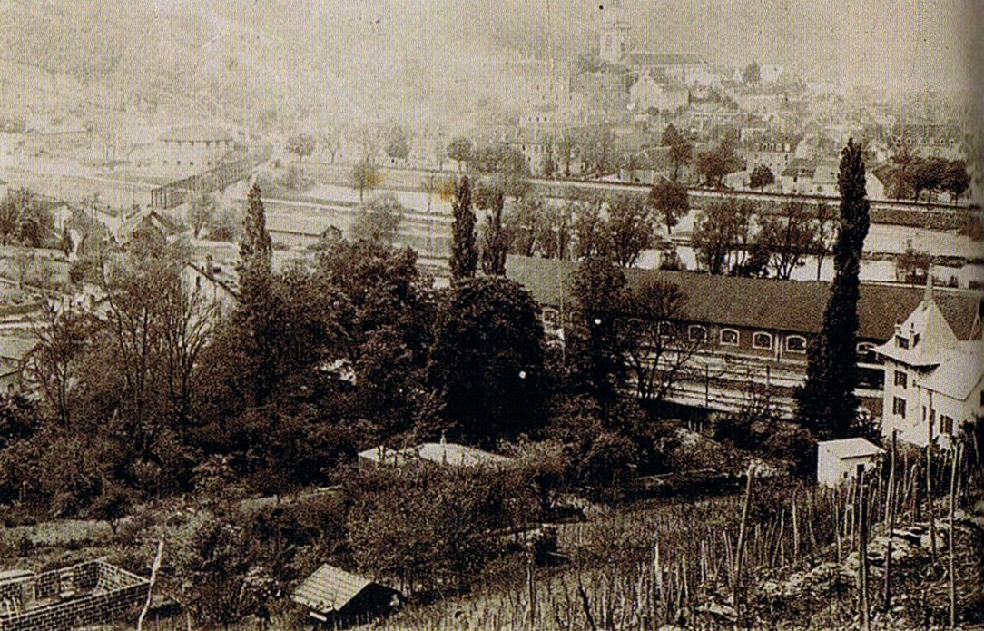 Bregille et ça vigne, vers 1880.